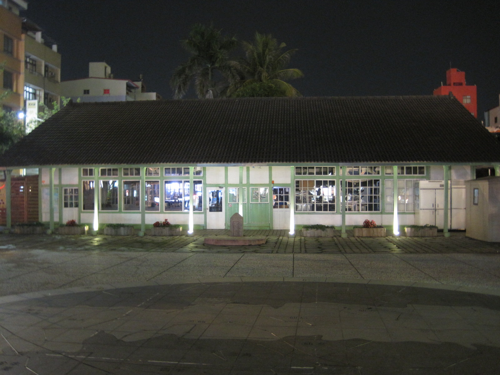 位在彰化孔廟旁的原彰化第二幼稚園